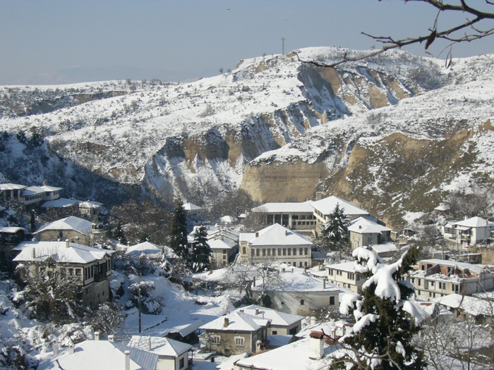 Melnik4.jpg